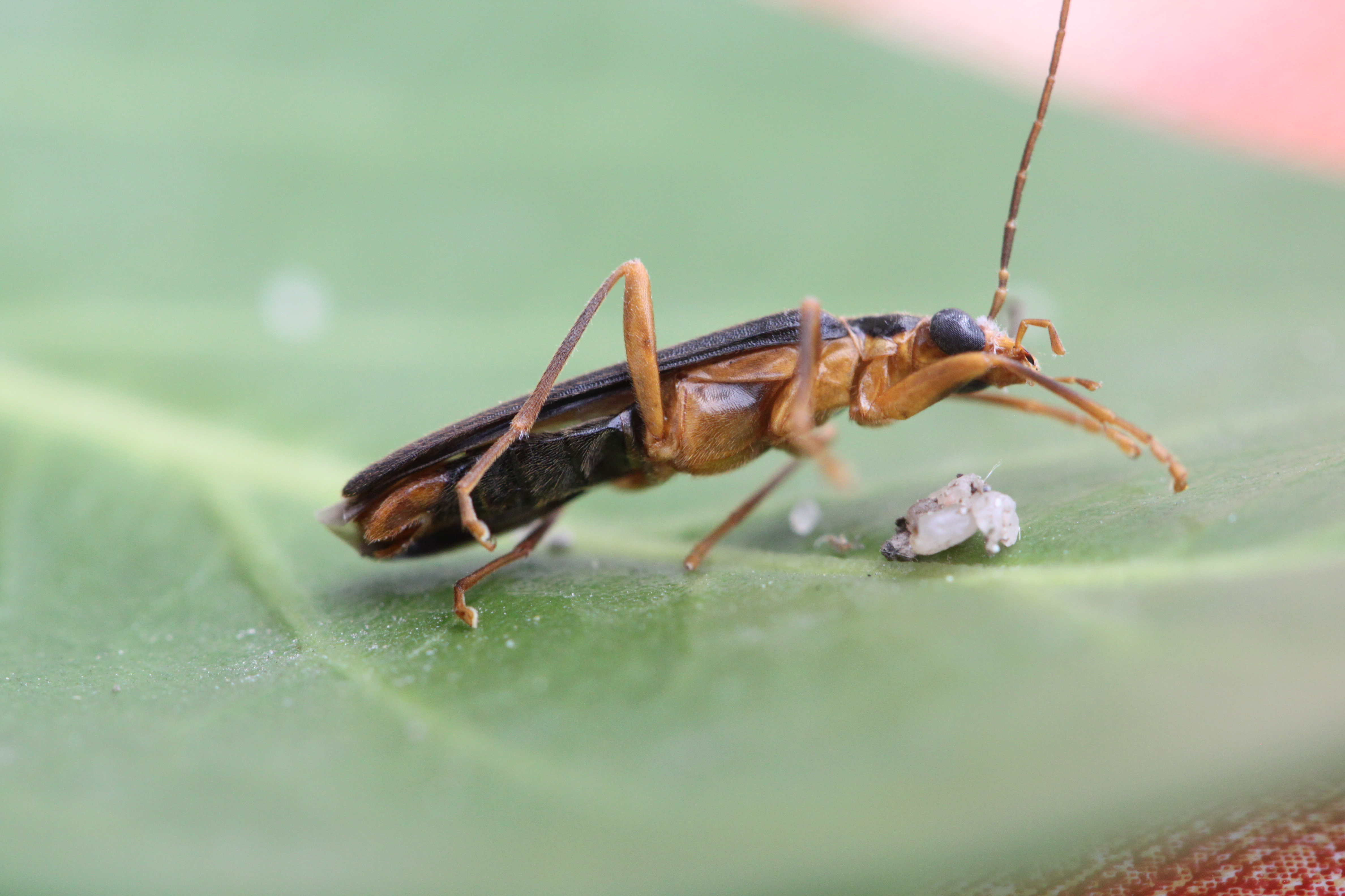 toter Krainer Scheinbockkäfer (Nacerdes carniolica) im Pfälzerwald